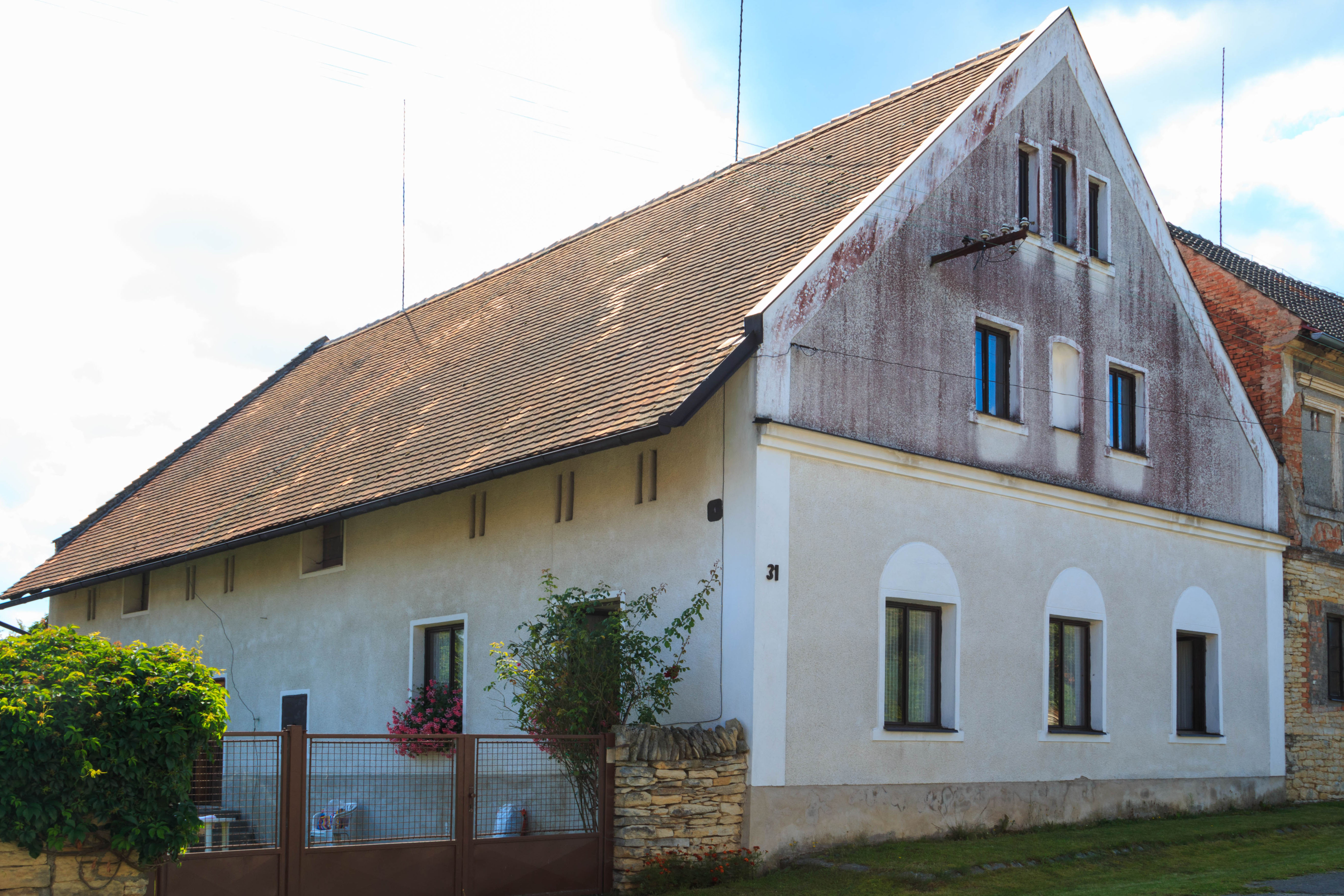 Lhota u Skutče - čp. 31